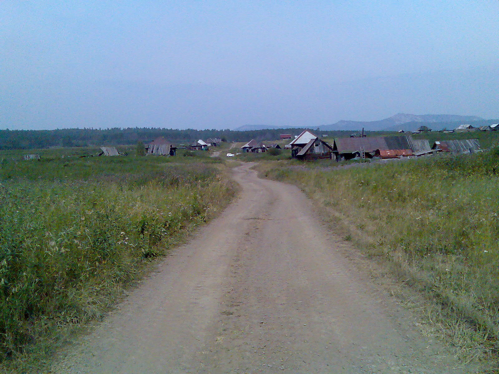 Въезд в Александровку